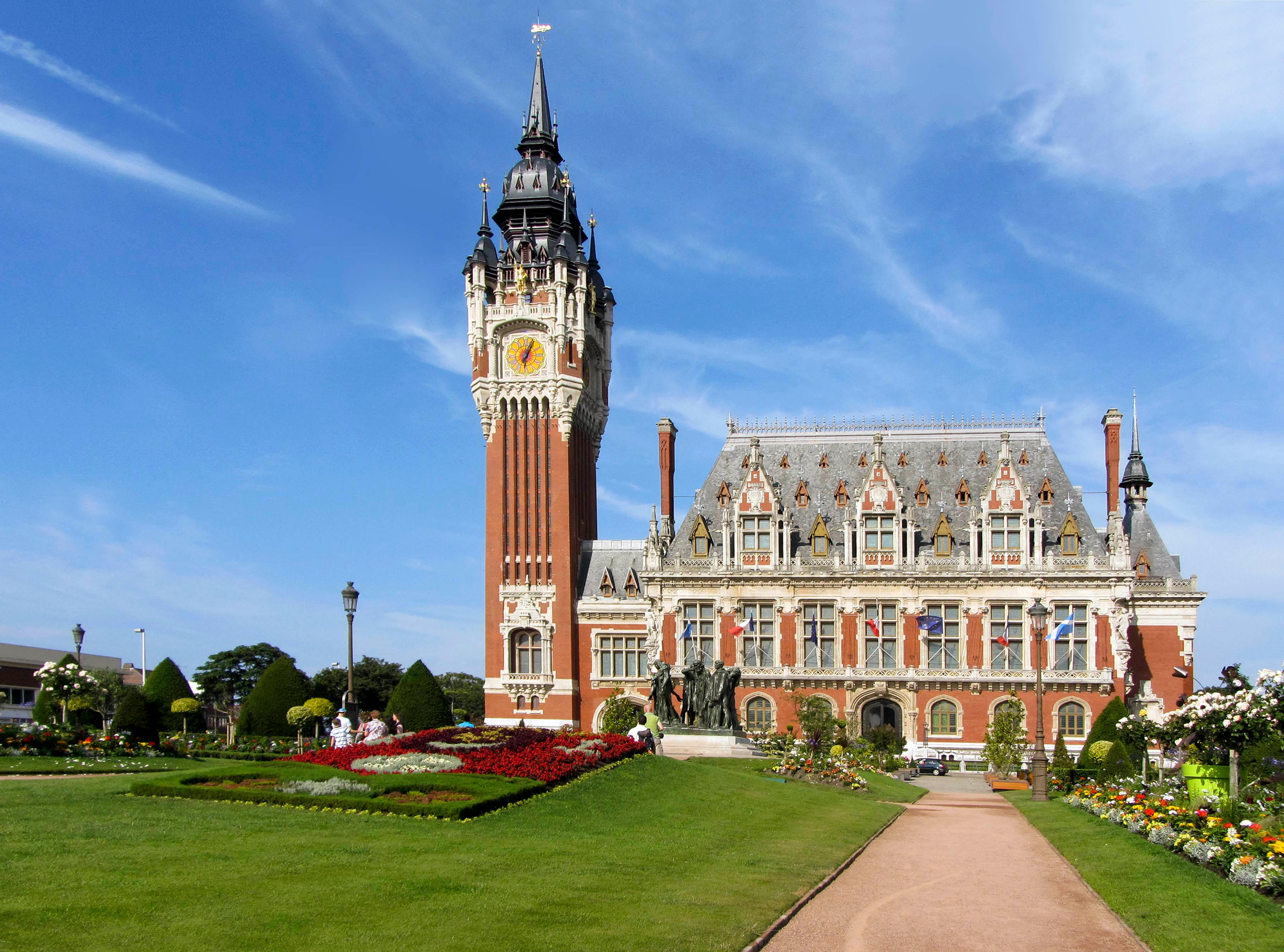 Belfried und Rathaus von Calais FR